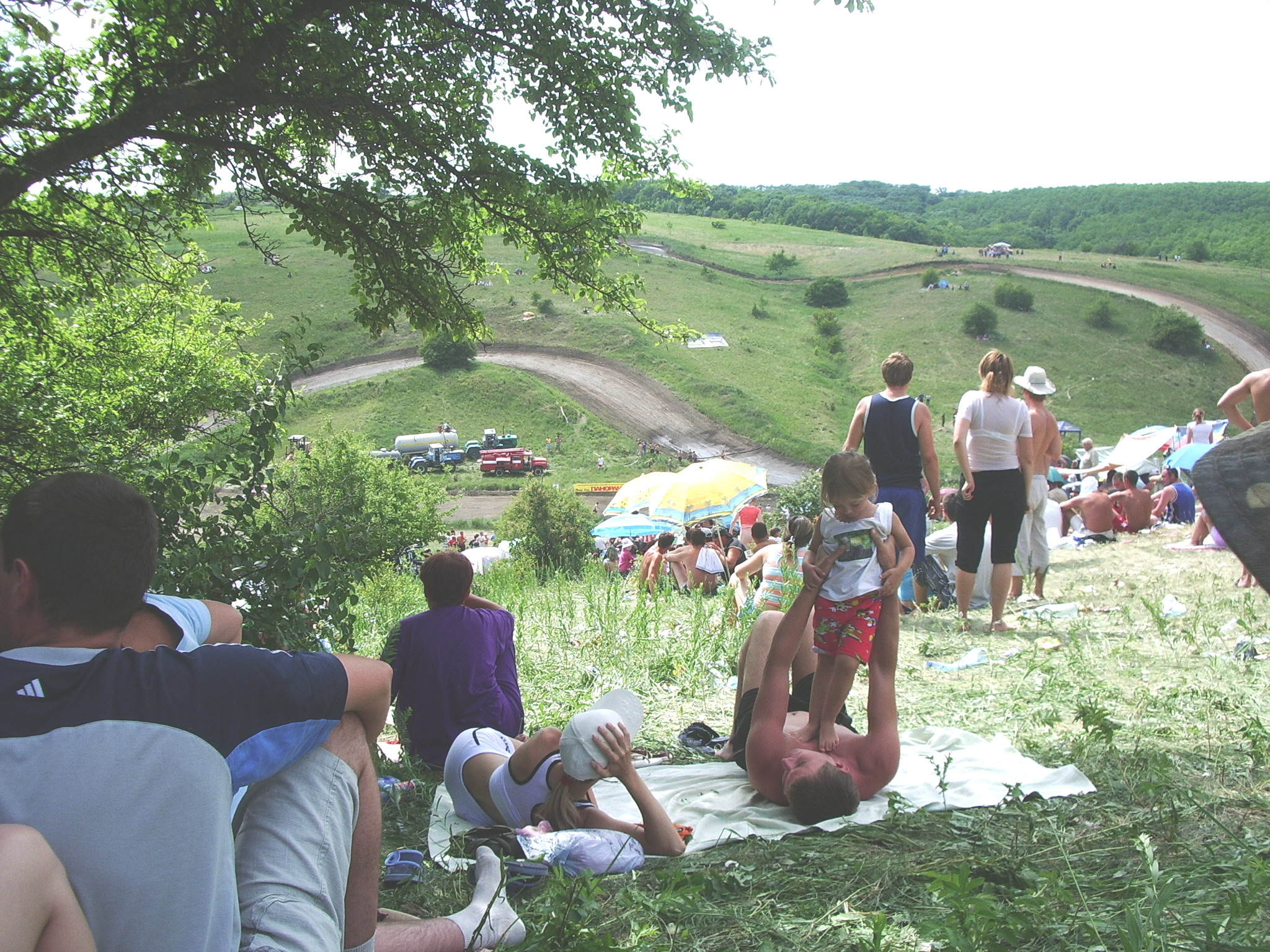 Старобельск. Автогонки. Старобельская трасса. Единственная в своём роде в Украине.